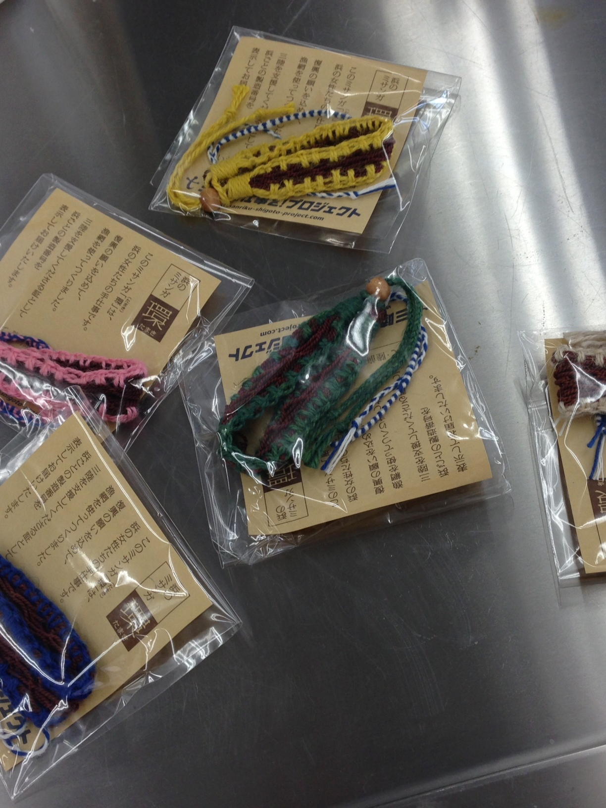 Misanga (Hama no Misanga "Tamaki")